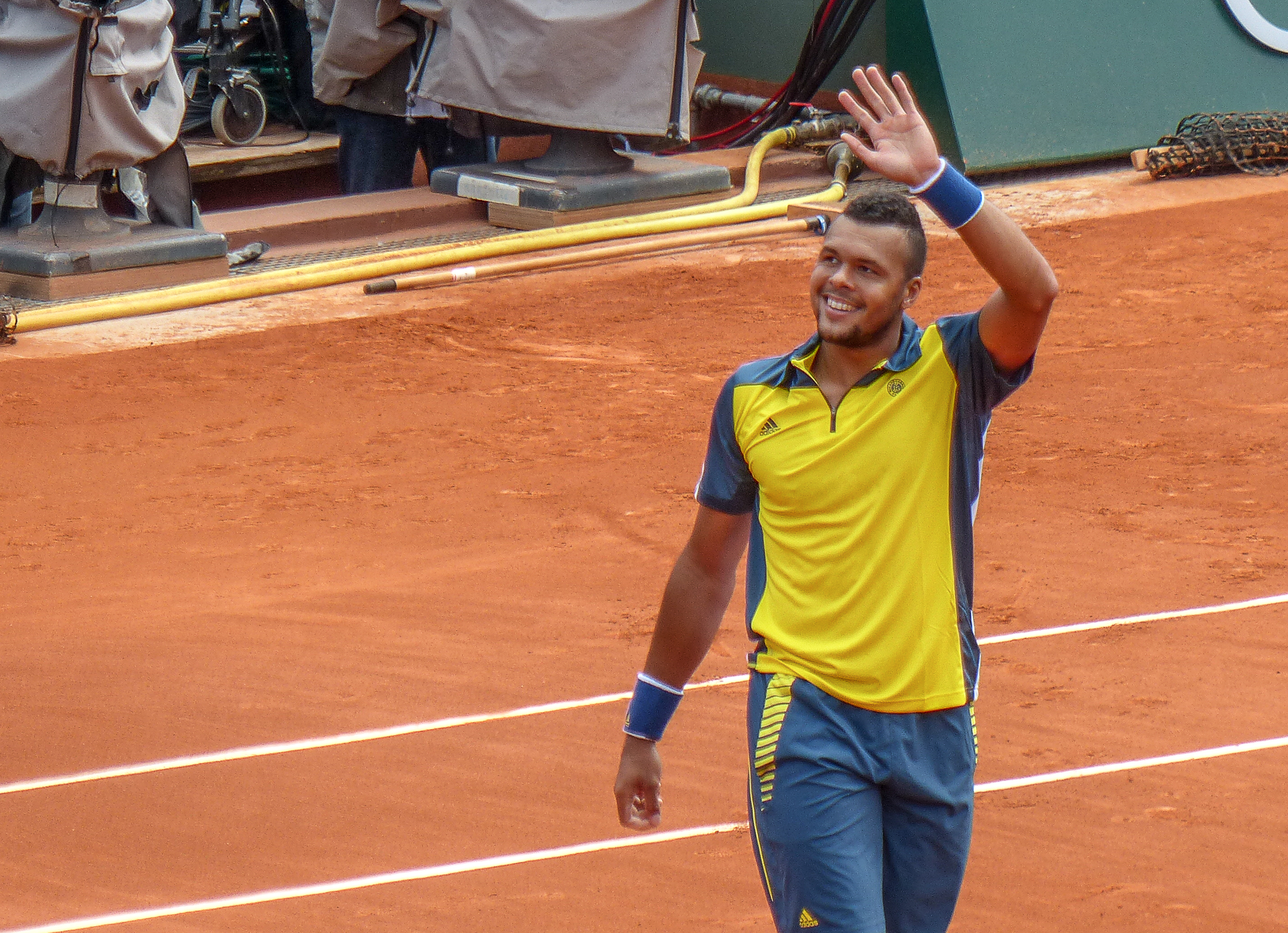 2013 French Open - Jo-Wilfried Tsonga vs Jarkko Nieminen (2nd round)